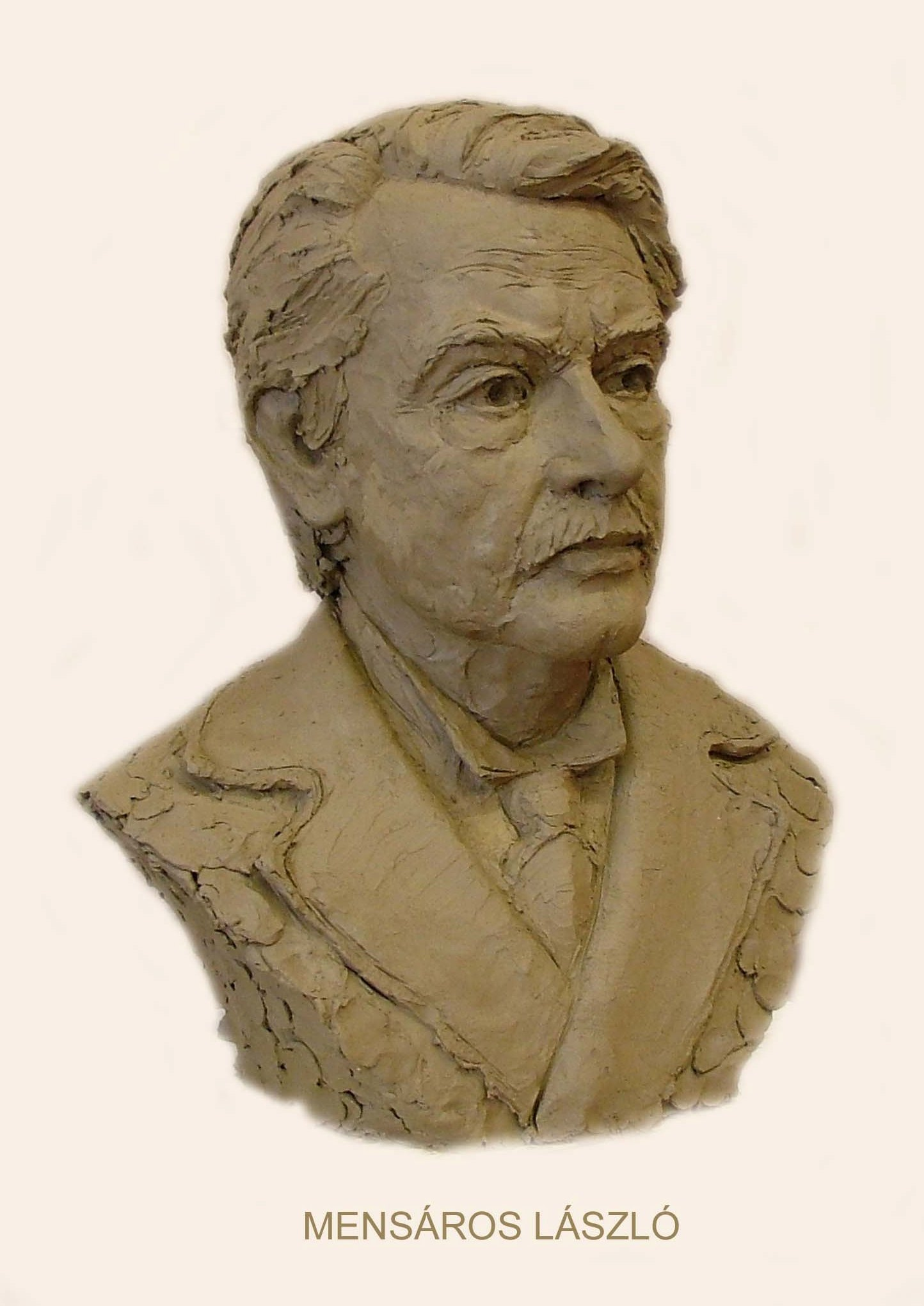 Juha Richárd: Mensáros László színművész (terrakotta)